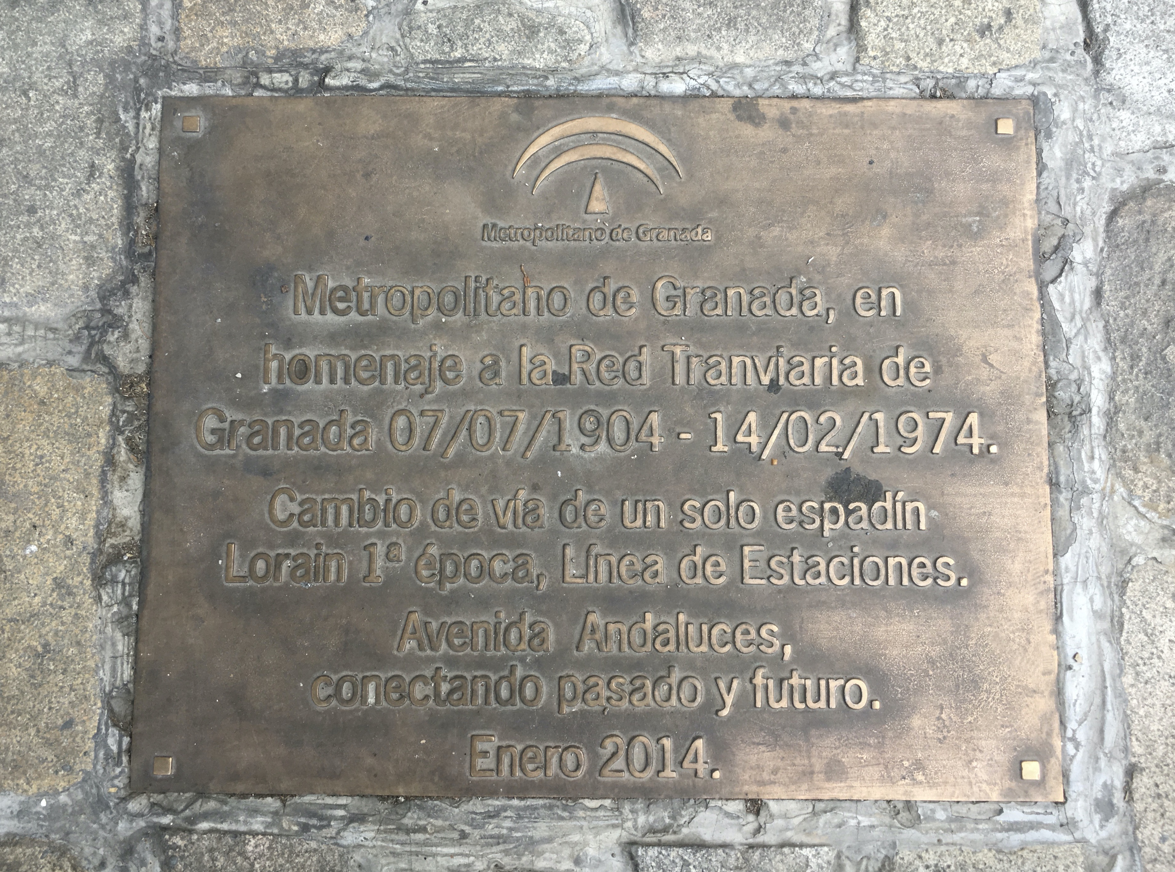 Placa homenaje del Metropolitano de Granada al tranvía de Granada en la Avenida de Andaluces. Se ha conservado un fragmento de un antiguo cambio de vías del tranvía junto a la plataforma del metro.